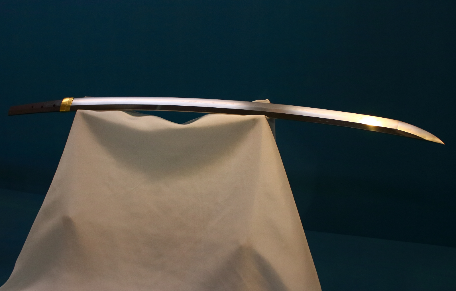 刀 - 「無銘 伝元重」長船元重（重要文化財）、南北朝時代・14世紀。東京国立博物館。